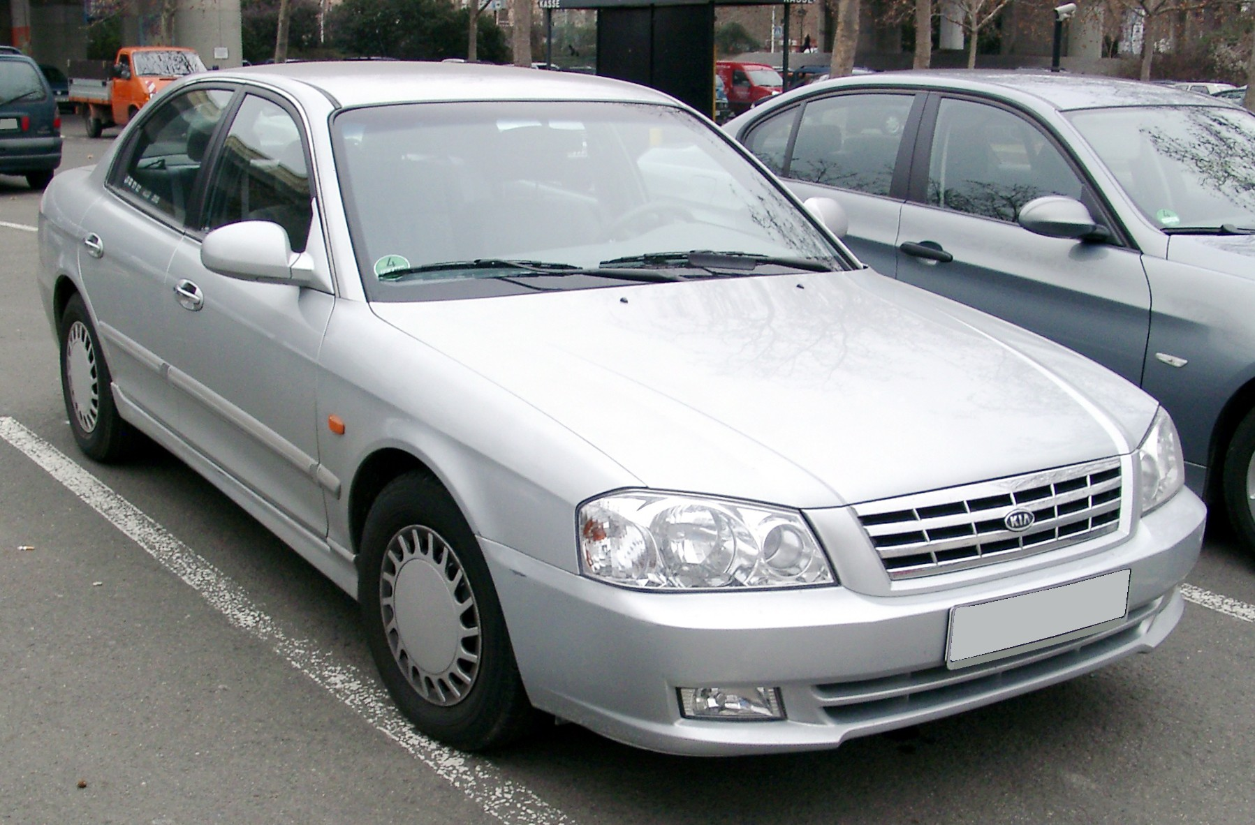 Kia Magentis, 1. Generation